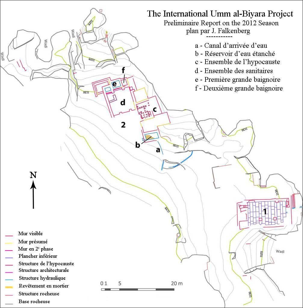 Thermes de Biyarah. Plan de la zone de fouilles ST 20 et 26.